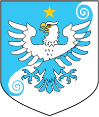 Герб МО Советское городское поселение Выборгского района Ленинградской области